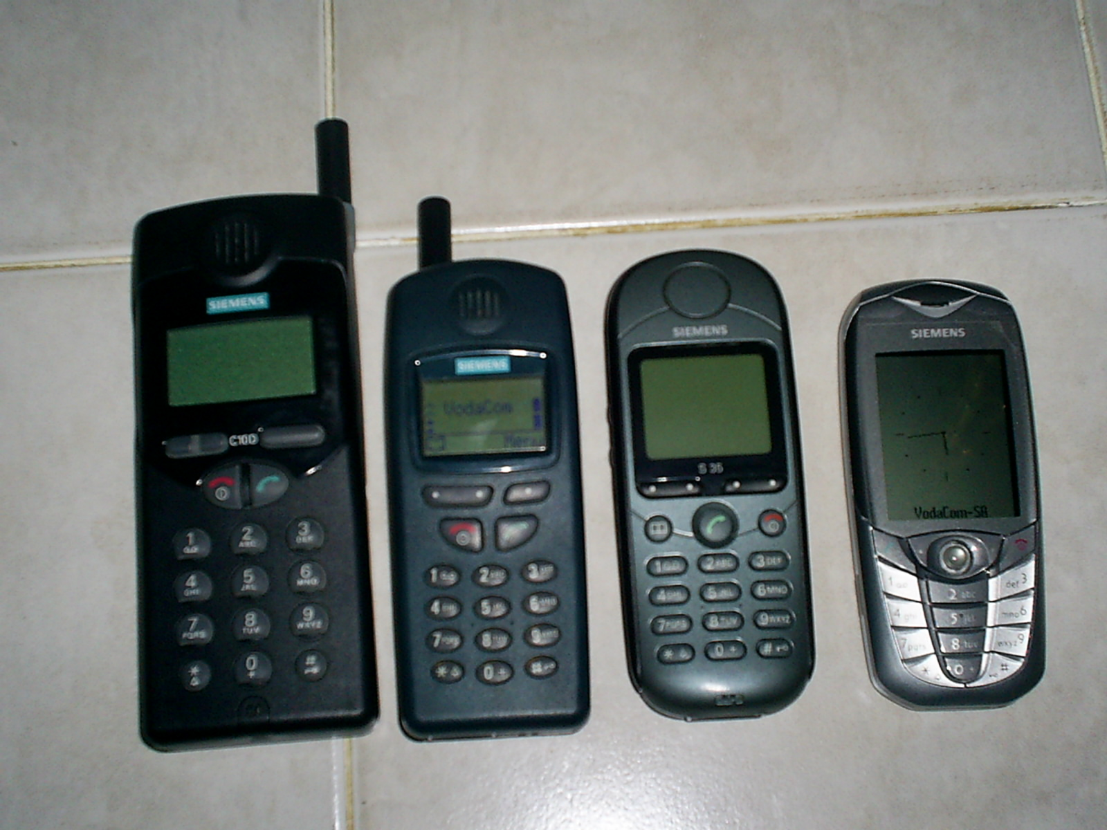 Siemens D10, C25, S35i, CX65